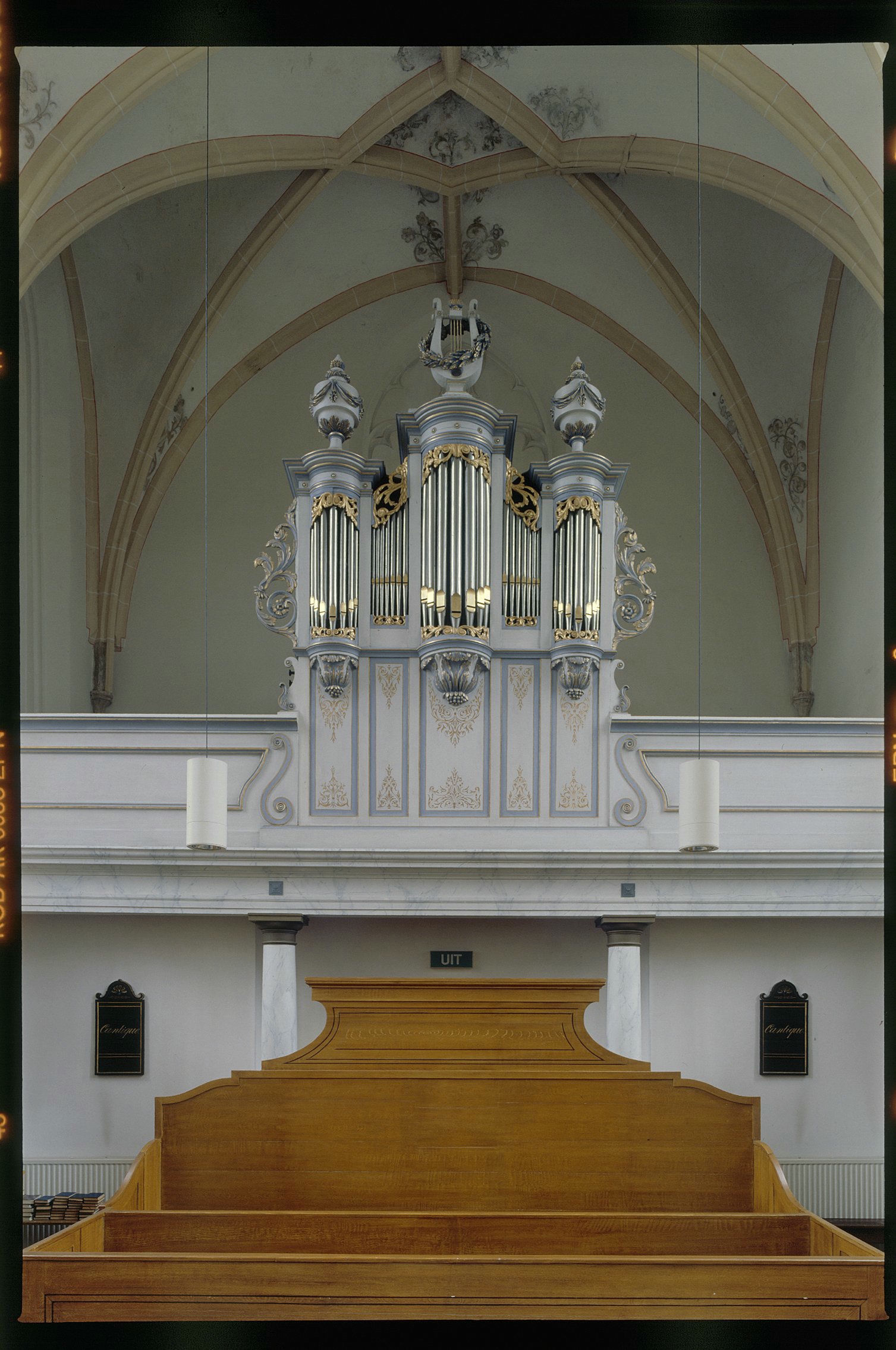 Waalse Kerk: Interieur, aanzicht orgel, orgelnummer 1795 (opmerking: Gefotografeerd voor Het Historische Orgel in Nederland 1819-1840, bladzijde 64)